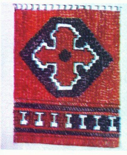 Кръст, везан с вълнени конци върху ръкав от риза (Битолска носия). Четирикрилен; горното и долното крило са малко по-широки от другите две; краищата на всичките крила се кръстосват още един път; контуриран е с черна линия. Копиран от оригинала из сбирката на Г. Т. Пеев в естествената си величина през март 1916 г.